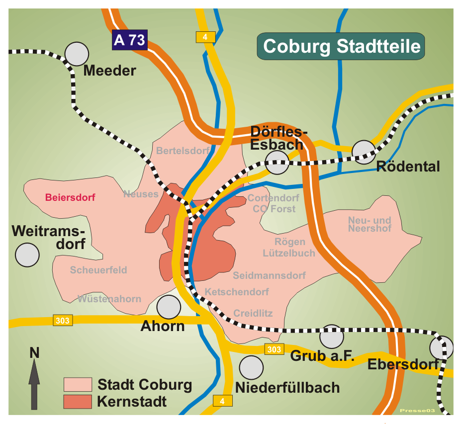 Karte von Coburg, Stadtteil Beiersdorf